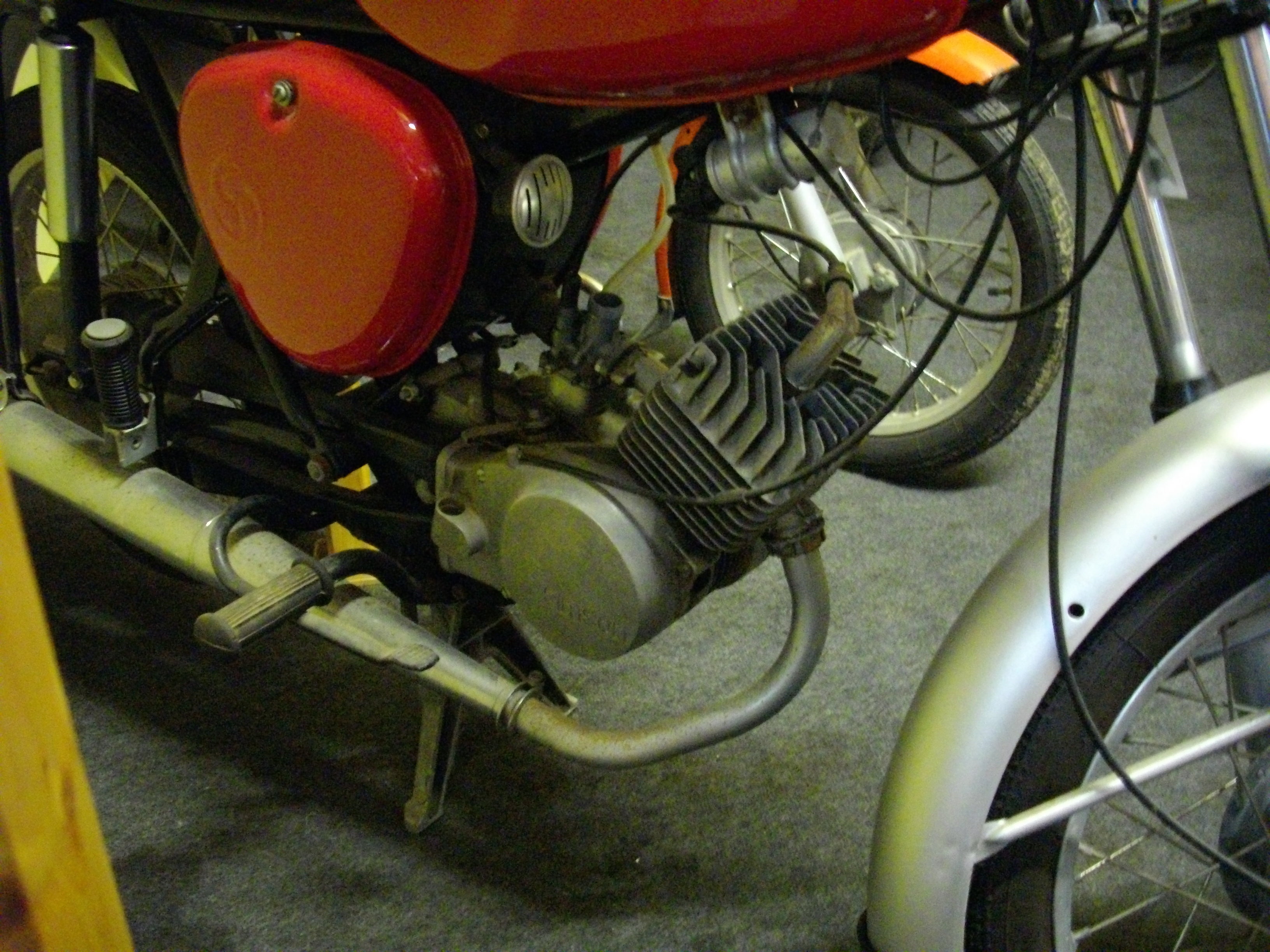 Simson S50-Motor.